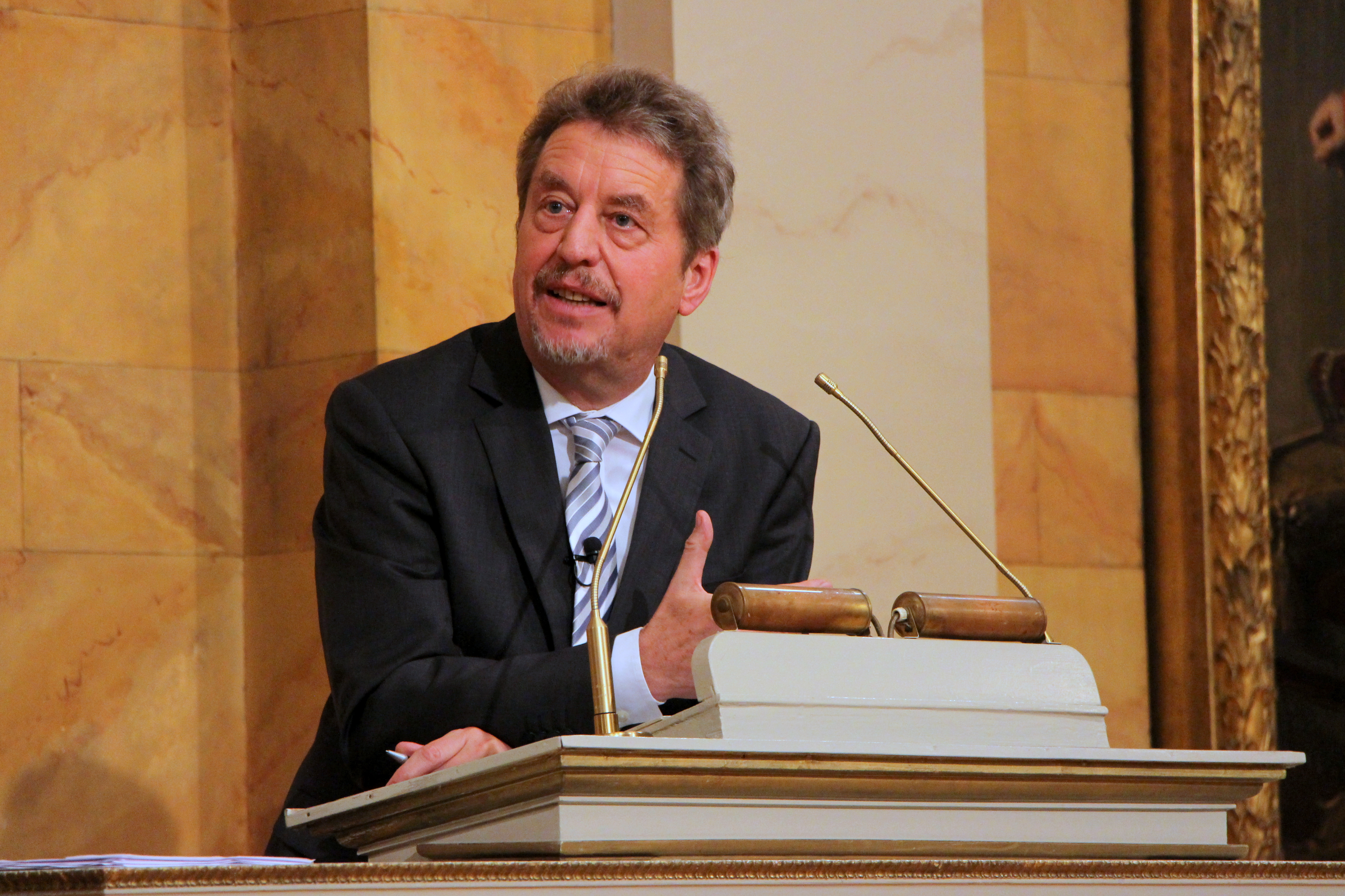 Hans Joas, Historikertag 2014 in Göttingen.